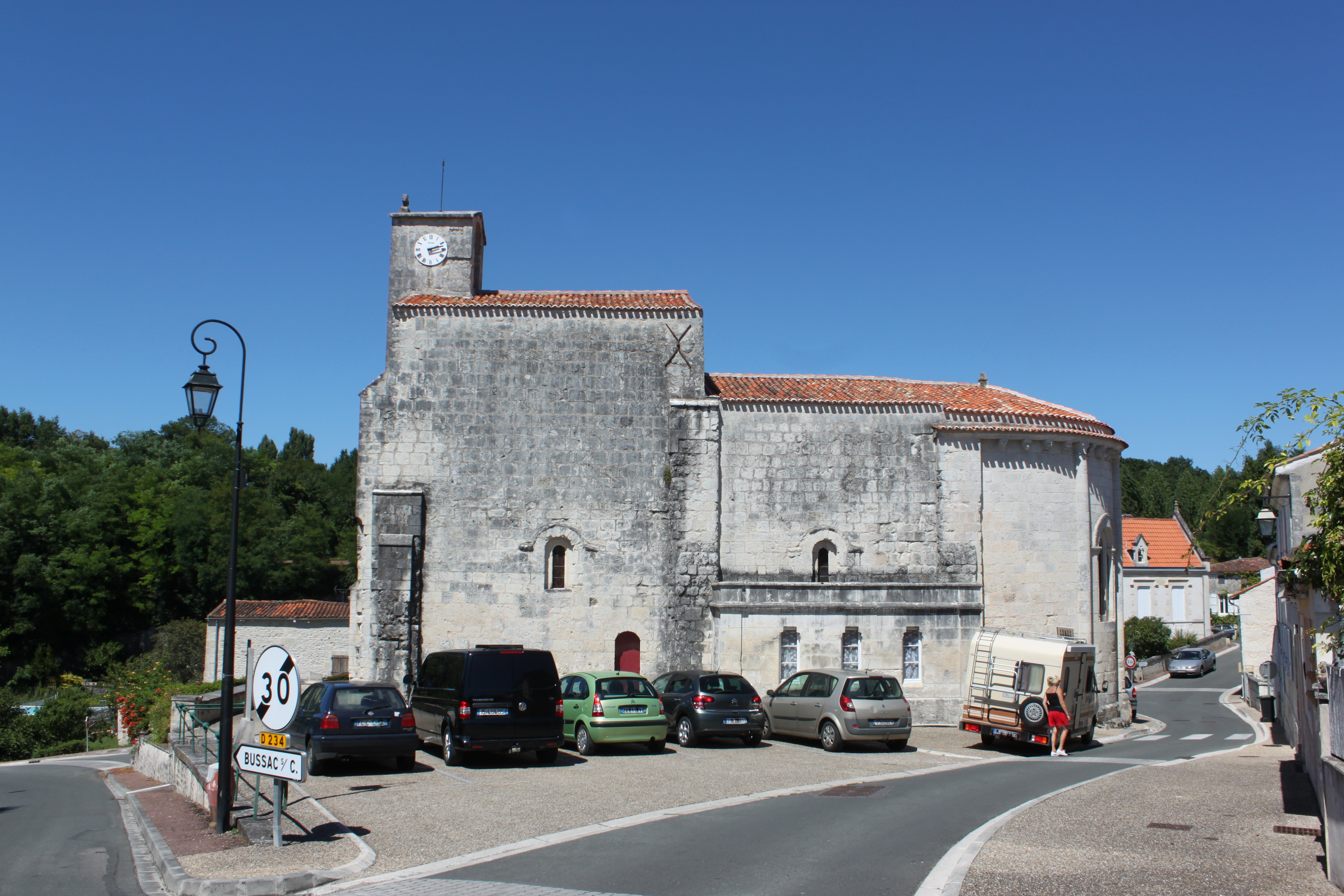 Église Saint-Vivien, Fr-17-Foncouverte.